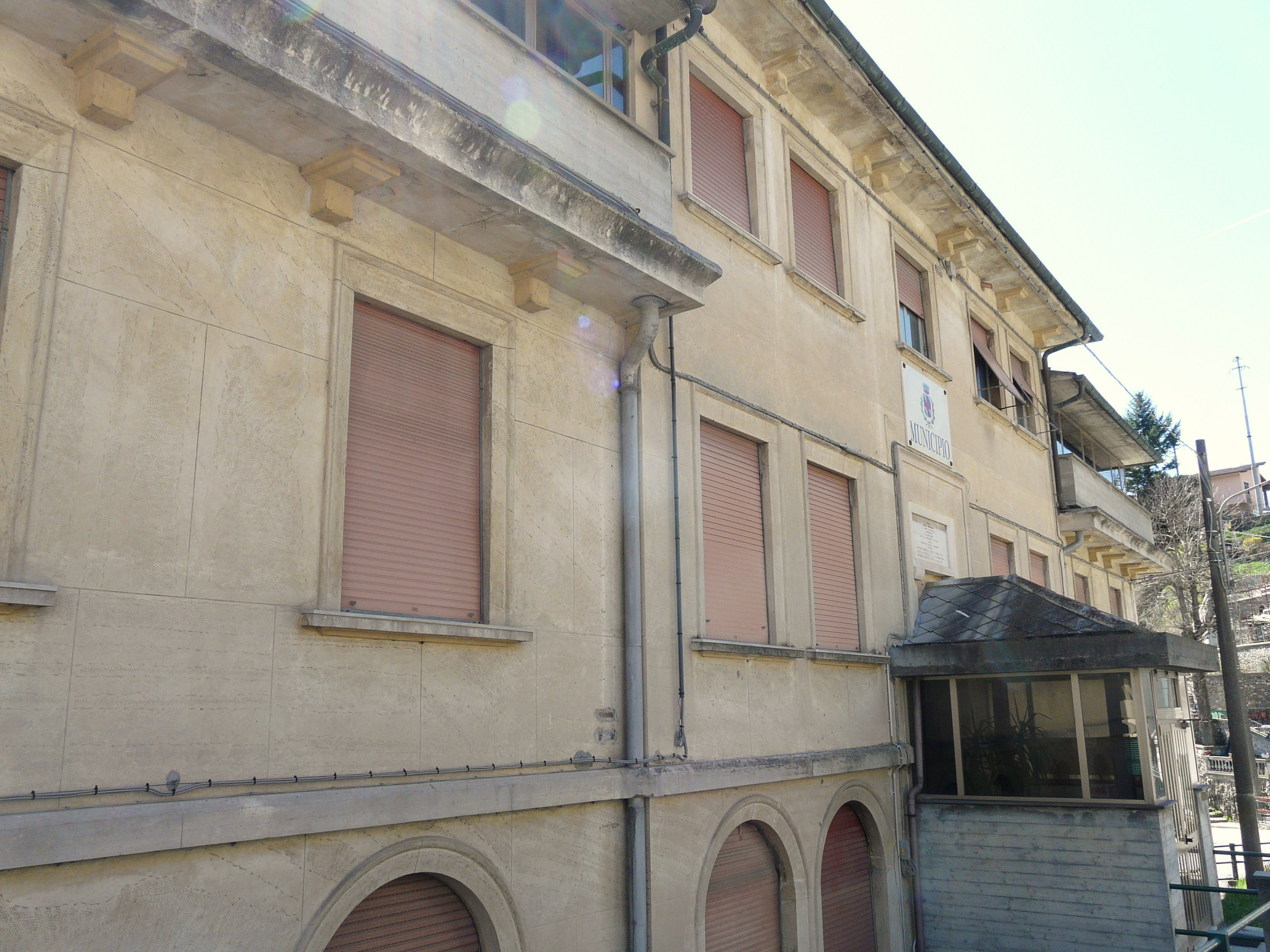 Municipio, Montoggio, Liguria, Italia